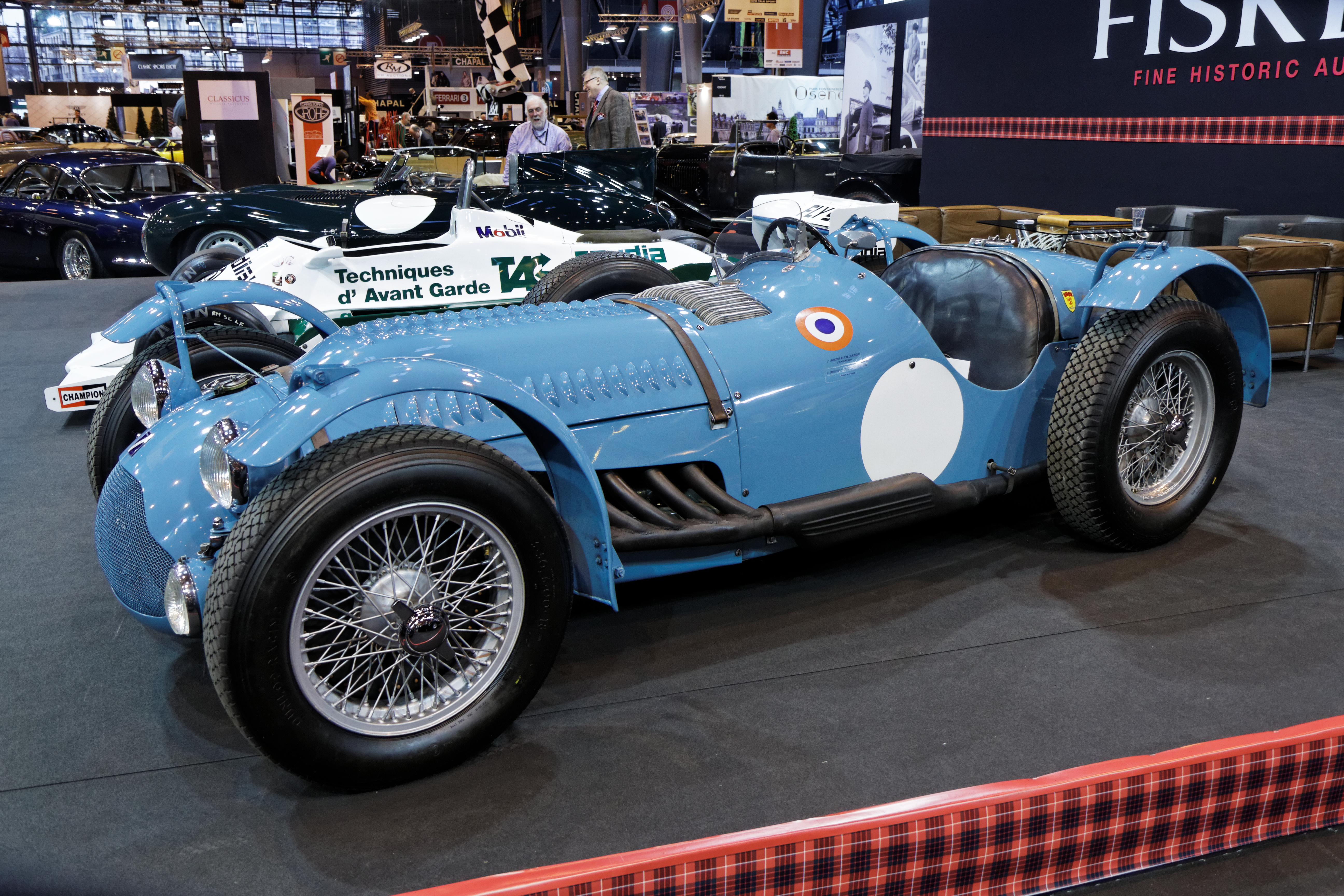 Une Talbot Lago T26 GS exposée lors du salon Retromobile 2014.